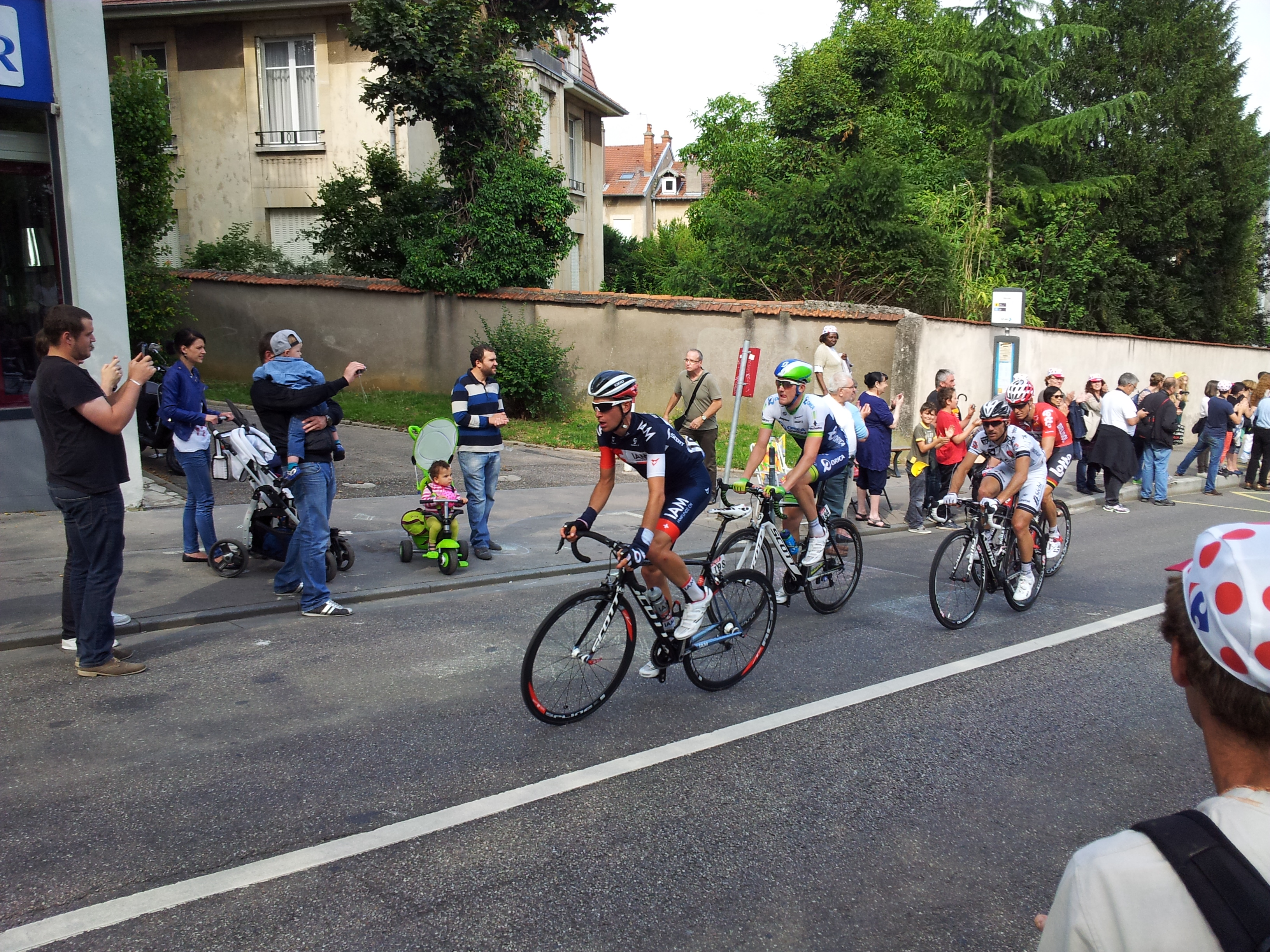 7e étape du Tour de France 2014 au début de la Côte de Boufflers.